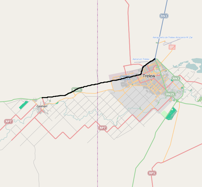 mapa de la autovia, Fuente OpenStreetMap